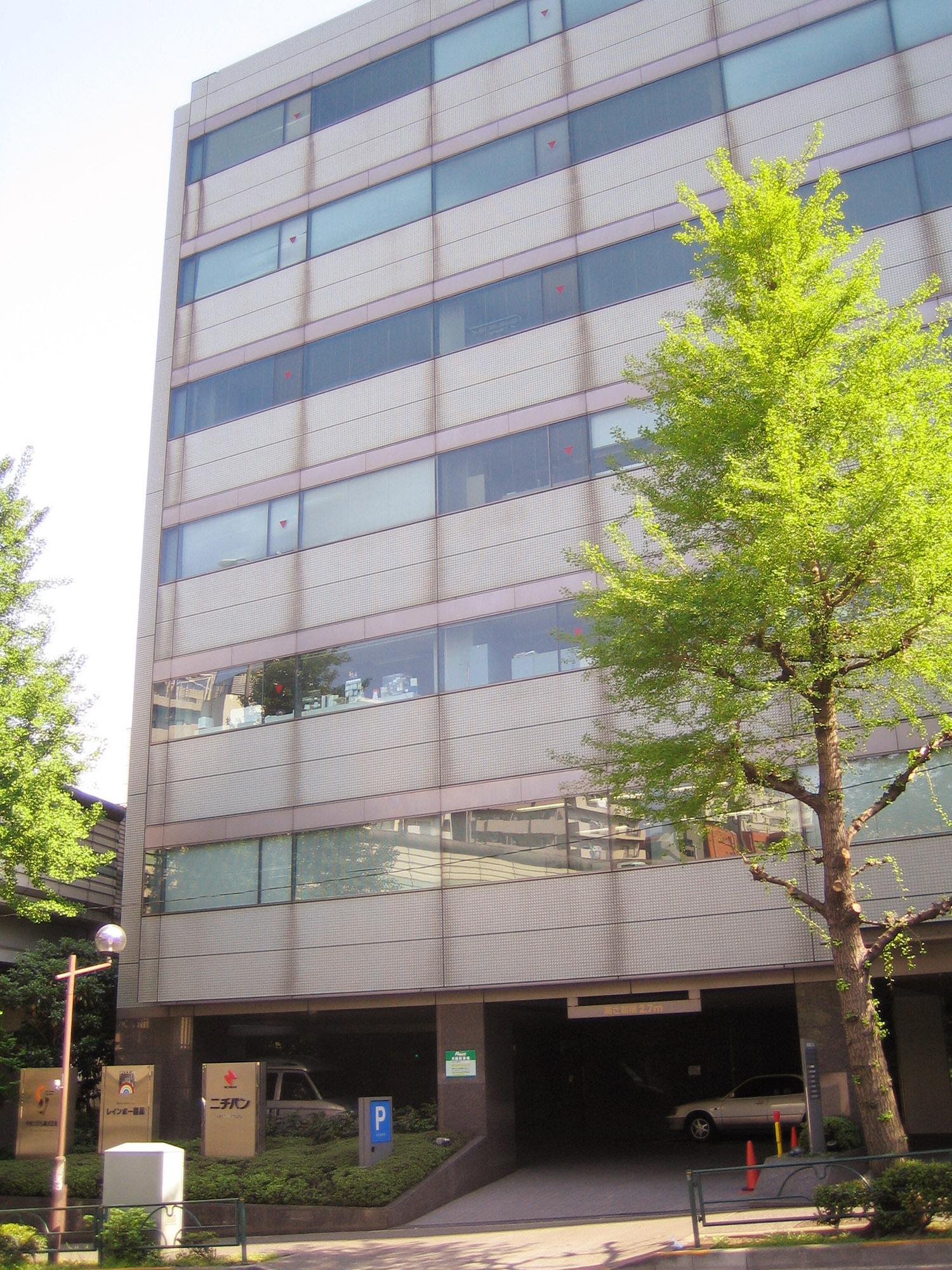 Nichiban Co., Ltd. (ニチバン株式会社), in Bunkyo, Tokyo, Japan